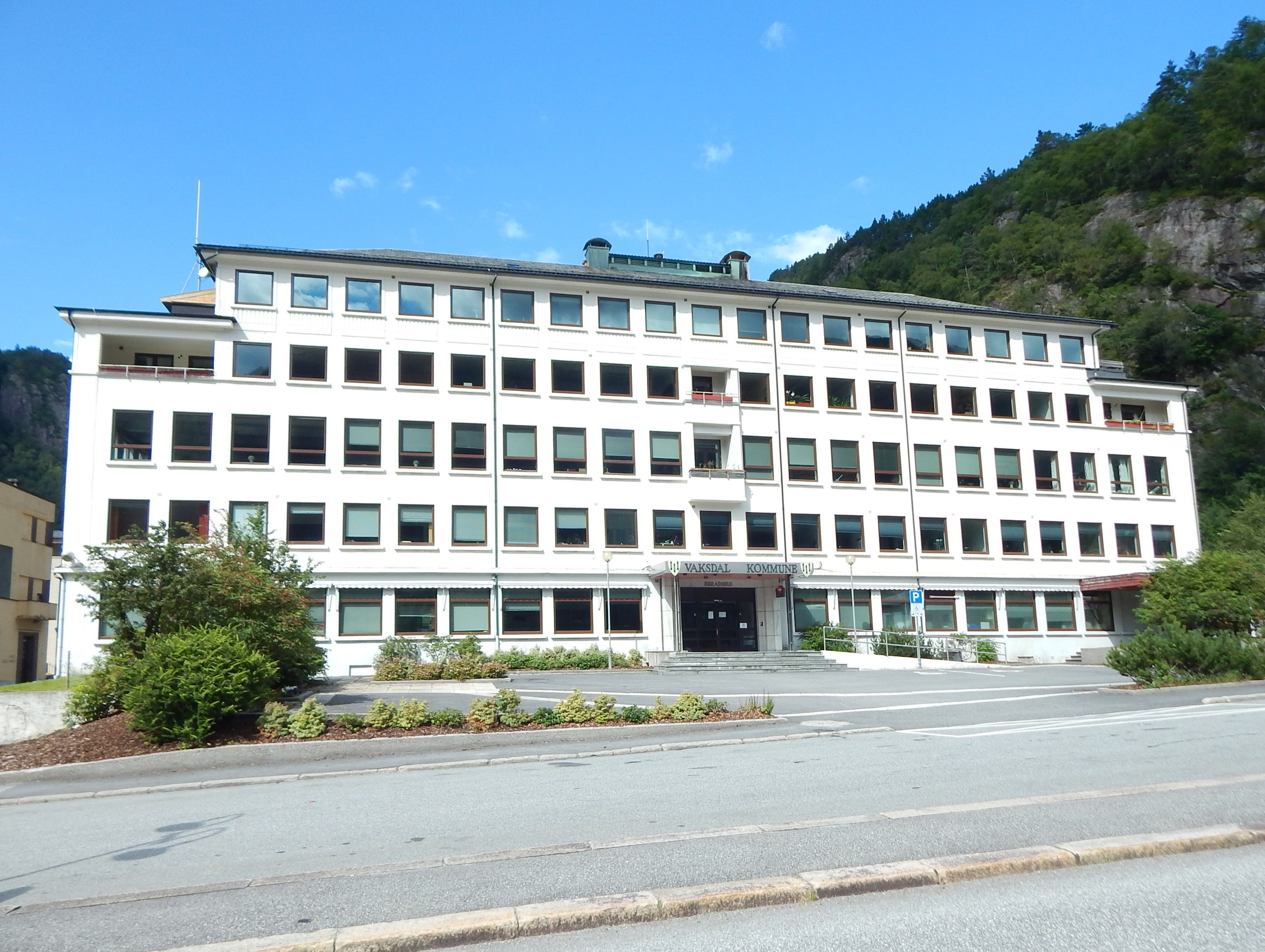 Vaksdal rådhus, Dale